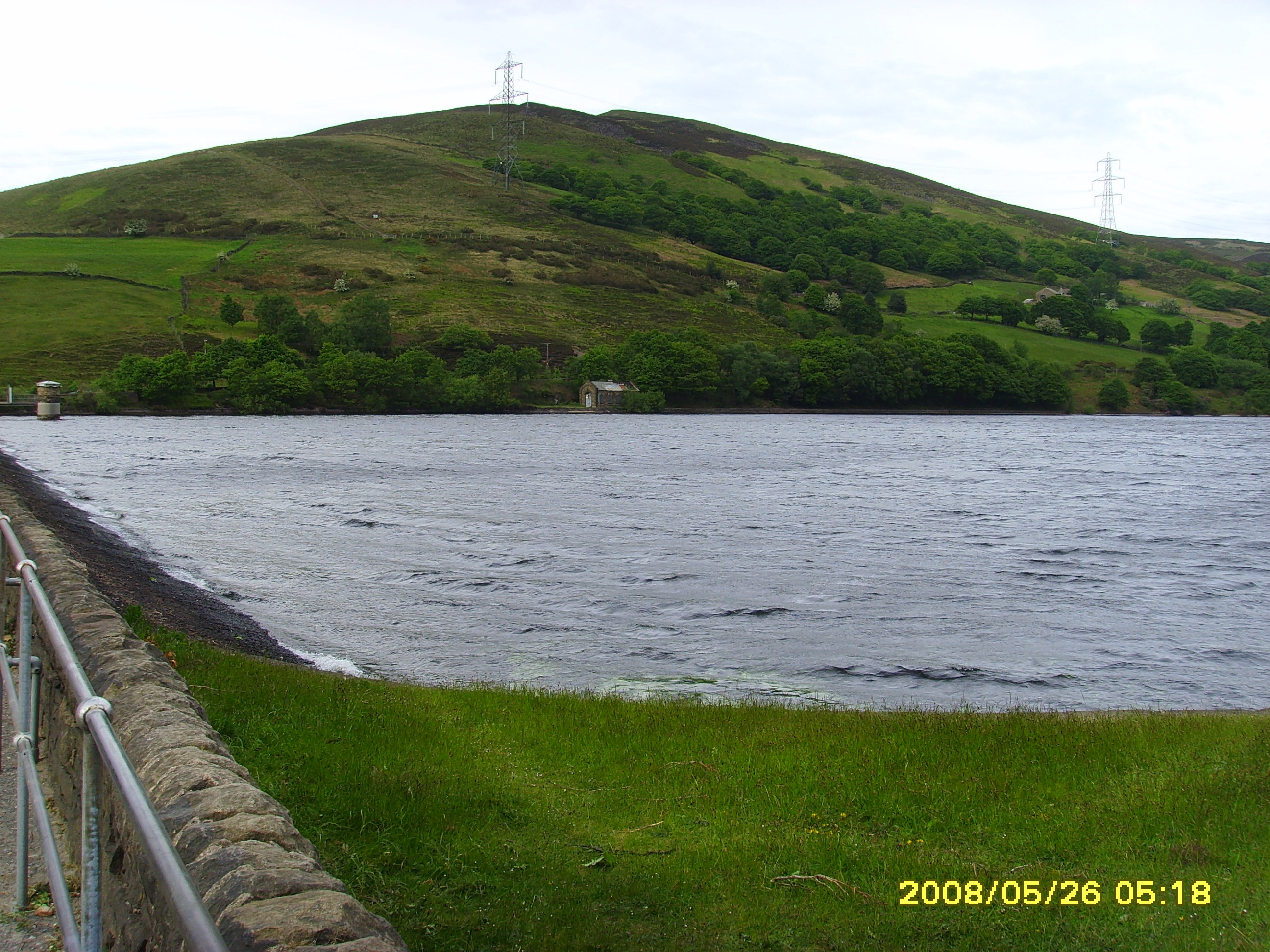 Walkerwood Reservoir